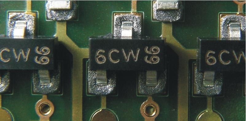 Bauelemente vor dem Reflowprozess erstellt von Martin Maier